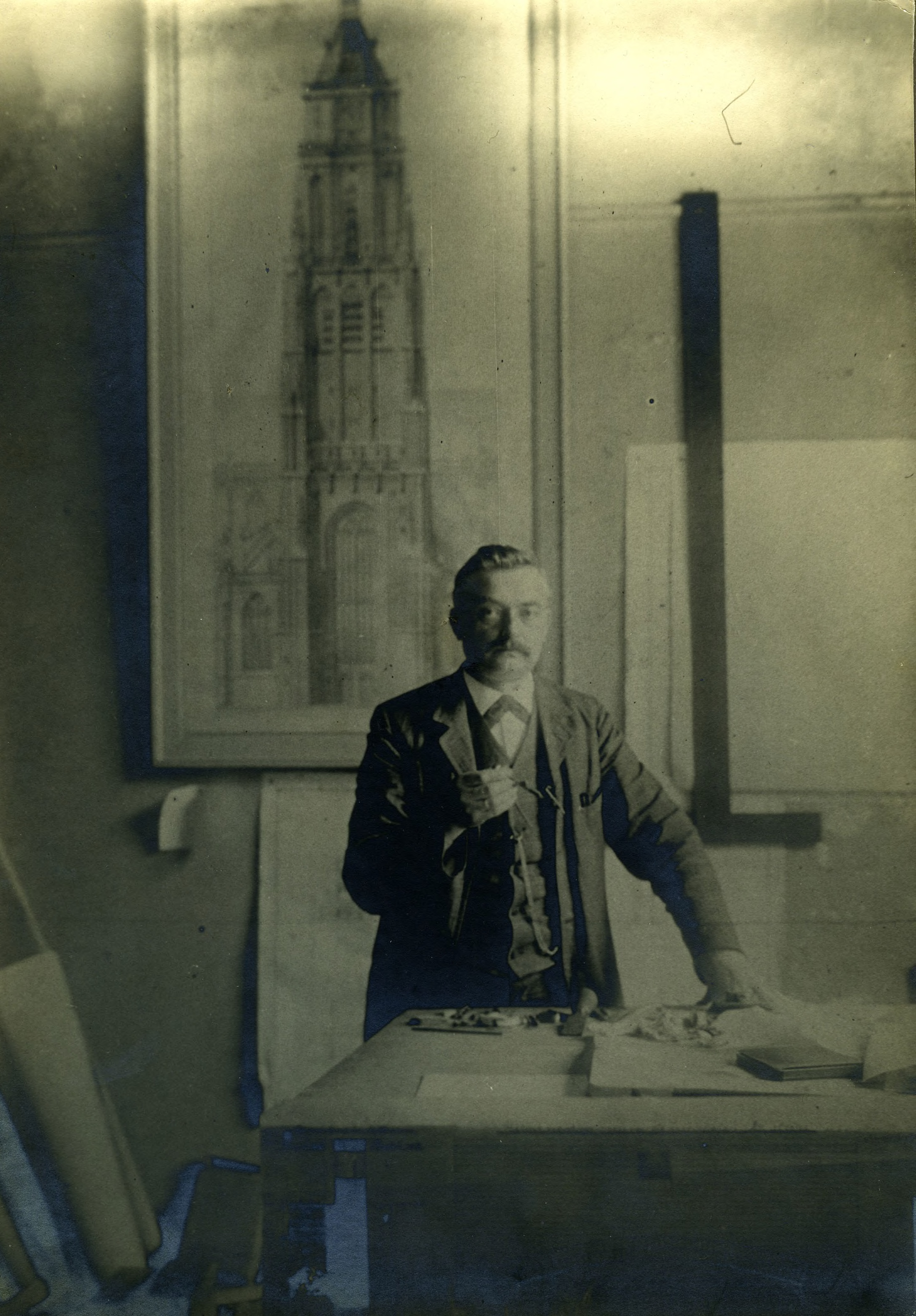 J. van Gent sr. Teekenaar van den grooten Eusebius Kerktoren te Arnhem (1899)